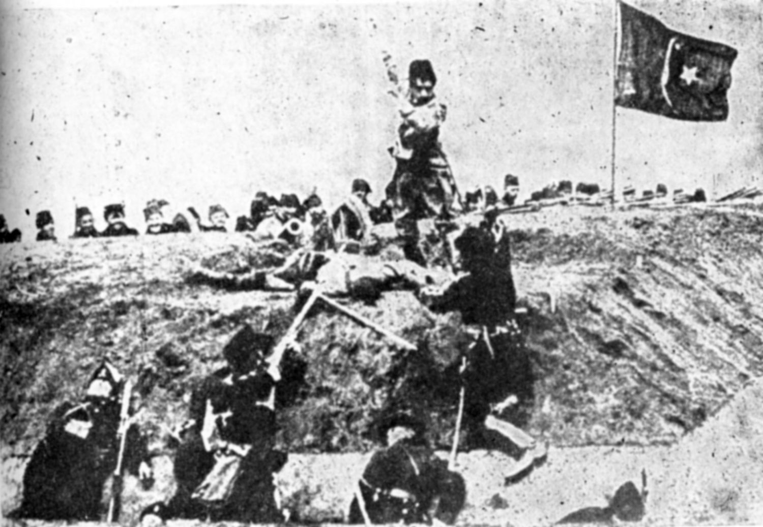 Frame from Independenţa României film (1912). Final assault.